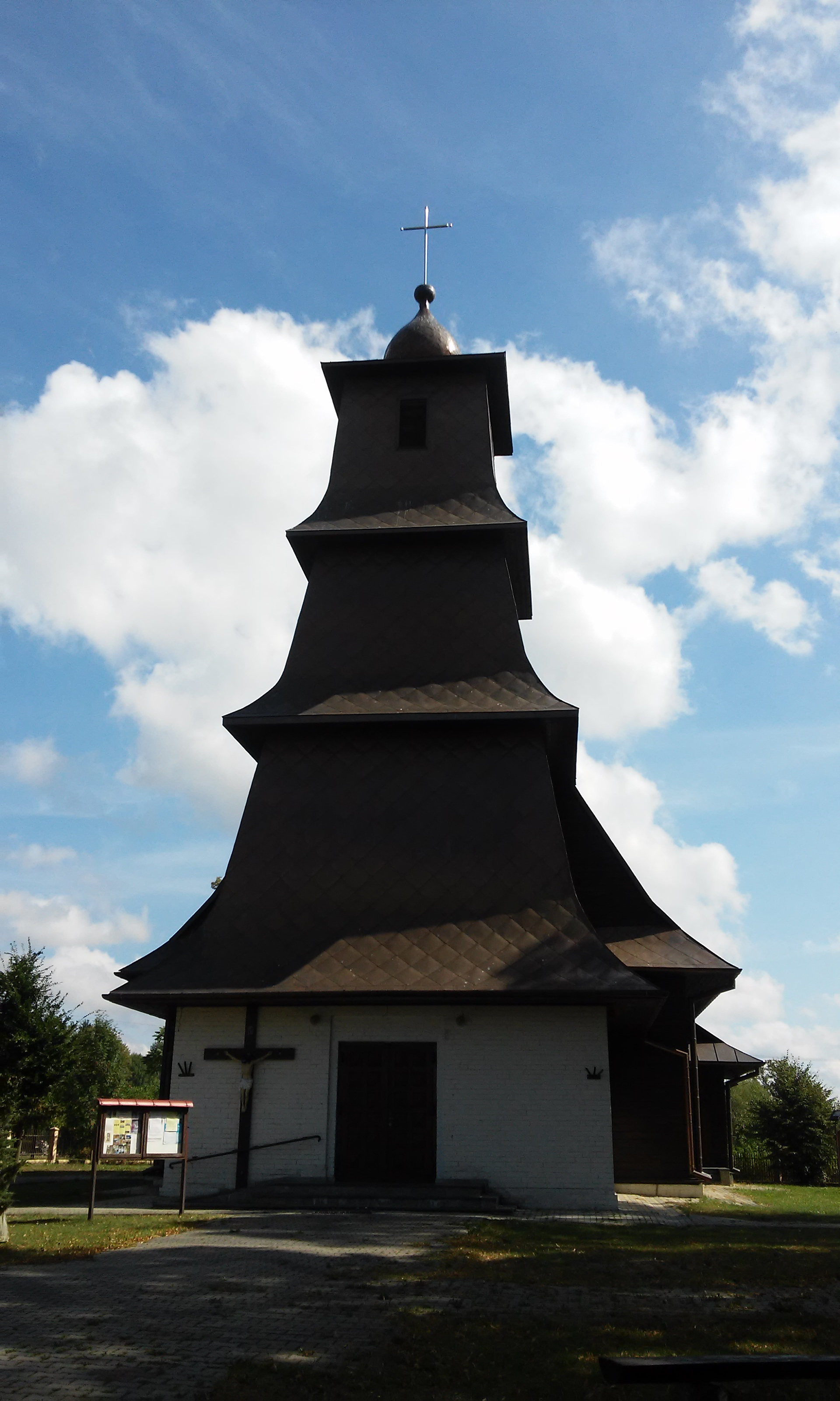 Kościół św. św. Piotra i Pawła w Kaniach